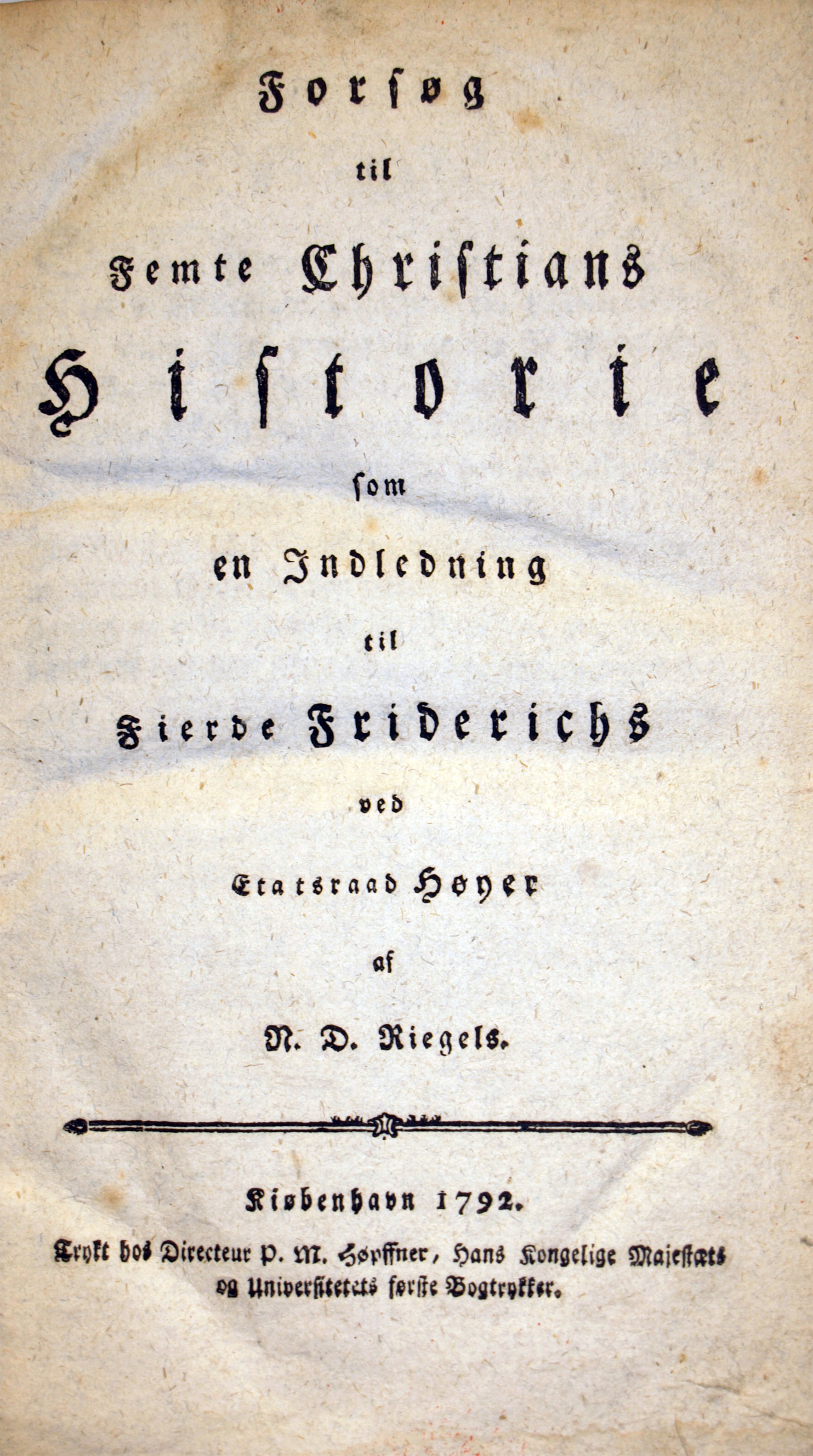 Titelbladet til Niels Ditlev Riegels' Forsøg til Femte Christians Historie som en Indledning til Fierde Friderichs ved Etatsraad Høyer fra 1792.